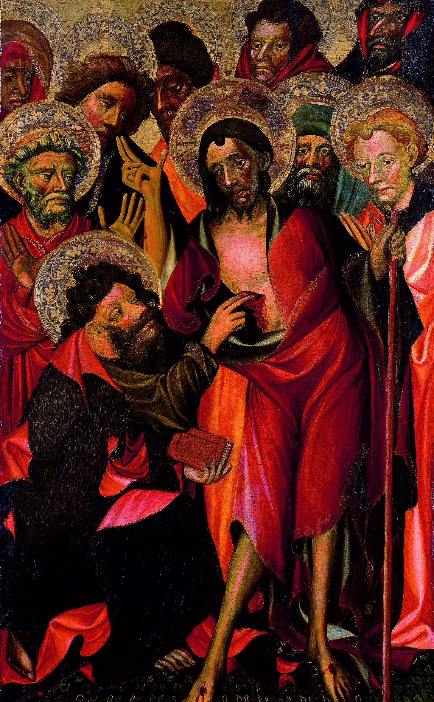 Incredulitat de sant Tomàs, pintat per Marçal de Sas cap a 1400 per a la capella de sant Tomàs de la Catedral de València. Actualment al Museu catedralici i diocesà de la Catedral de València.